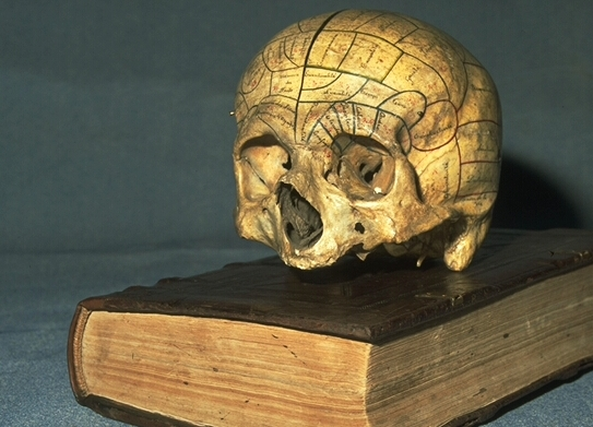 Carte phrénologique indiquant les zones des facultés intellectuelles. Collection Gall, Musée d'anatomie Testut Latarjet de Lyon.